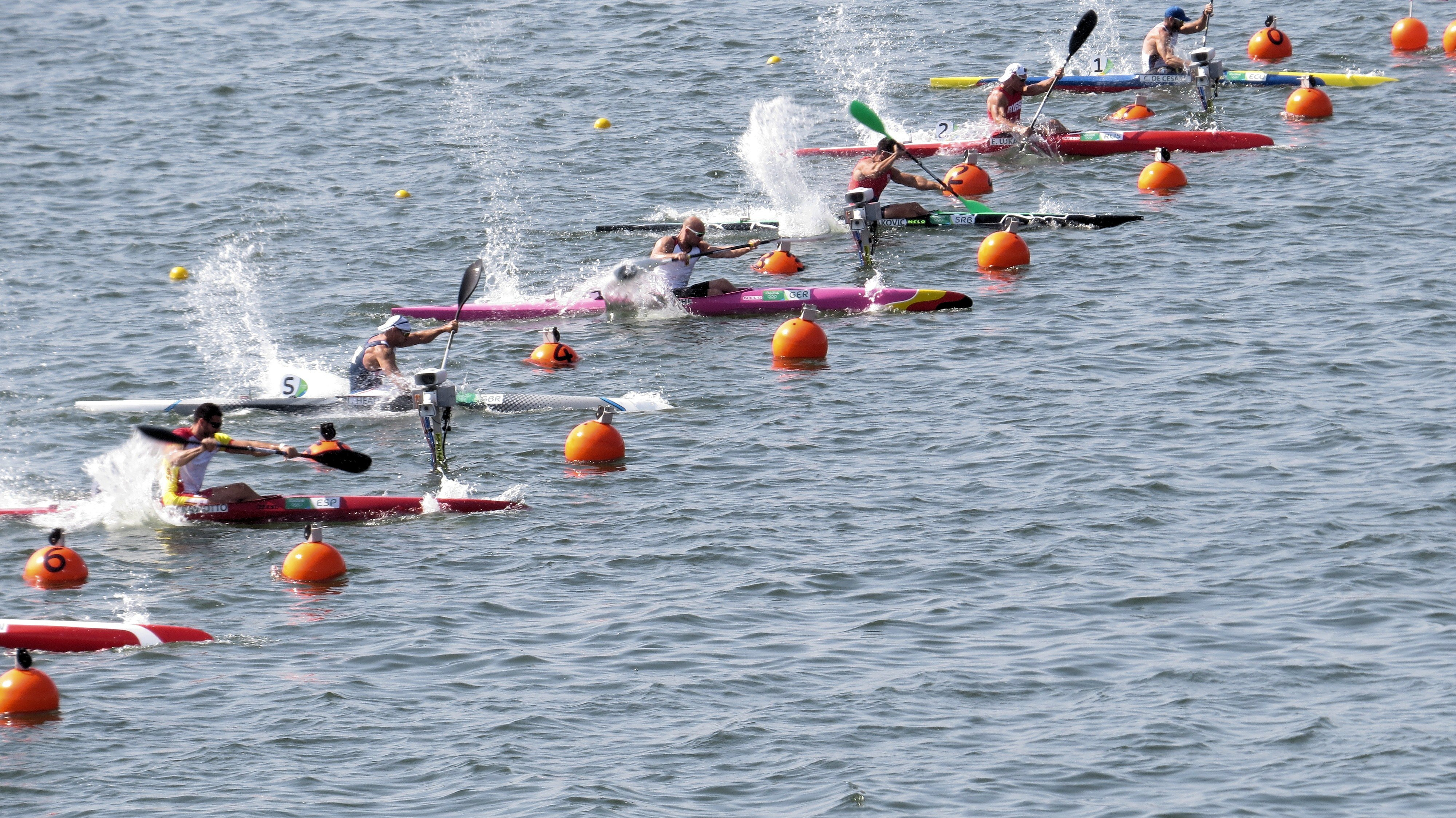 Sx50